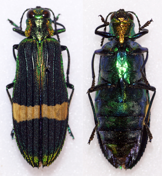 Buprestidae - In collection